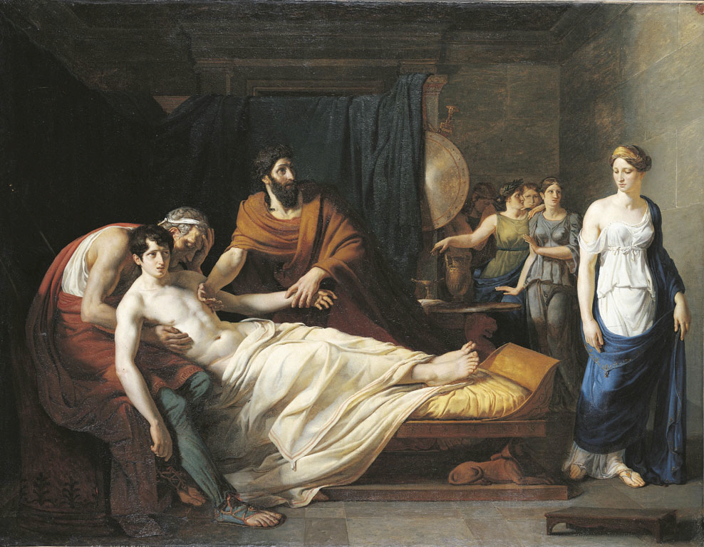 Alexandre-Charles Guillemot, Erasistrate découvre la maladie d'Antiochus, 1808, Paris, Ecole Nationale Supérieure des Beaux-Arts